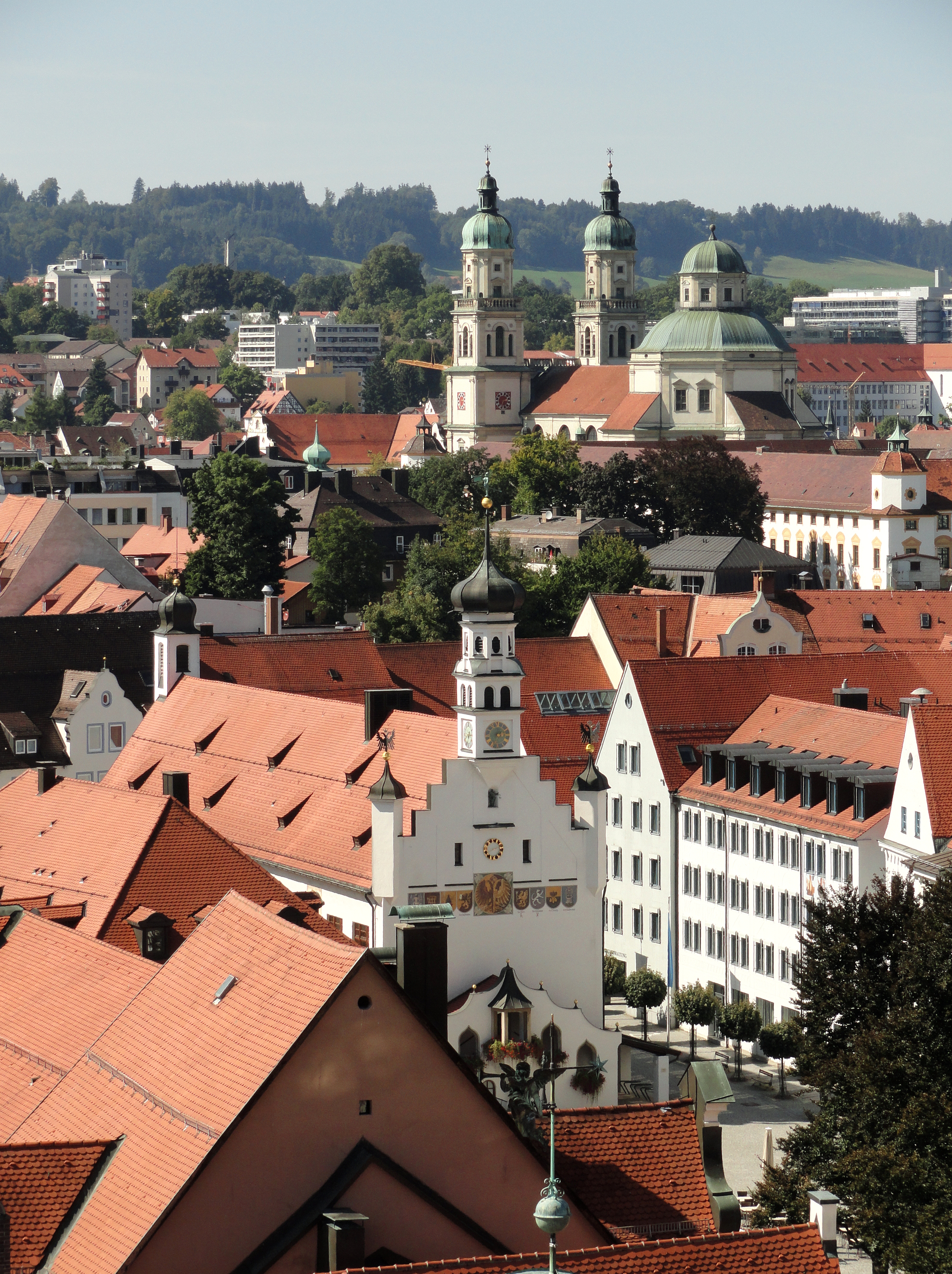 Blick vom Kirchturm der St. Mang-Kirche auf den Rathausplatz mit Rathaus und St. Lorenz-Kirche.